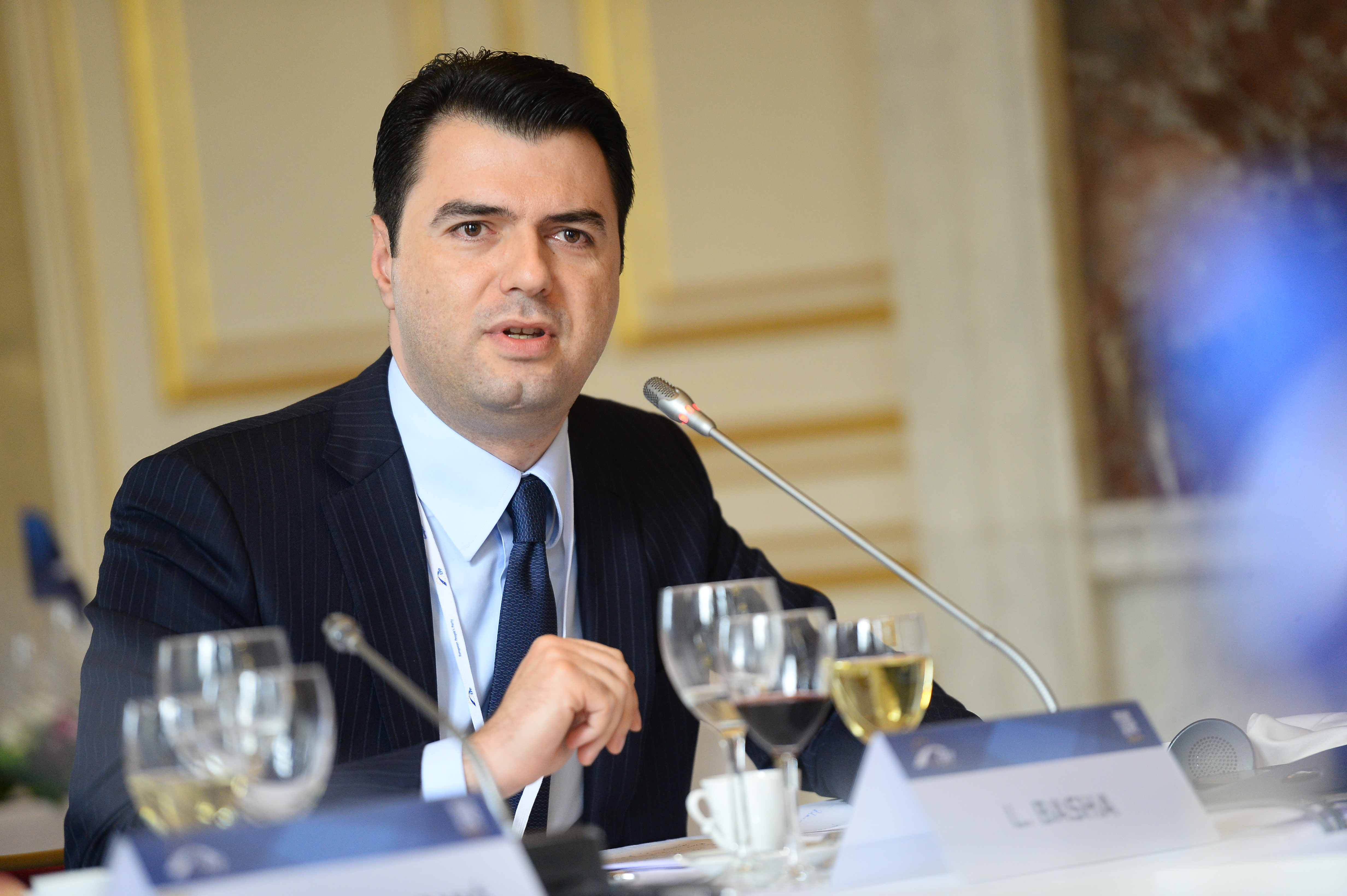 EPP Summmit, Brussels; October 2014